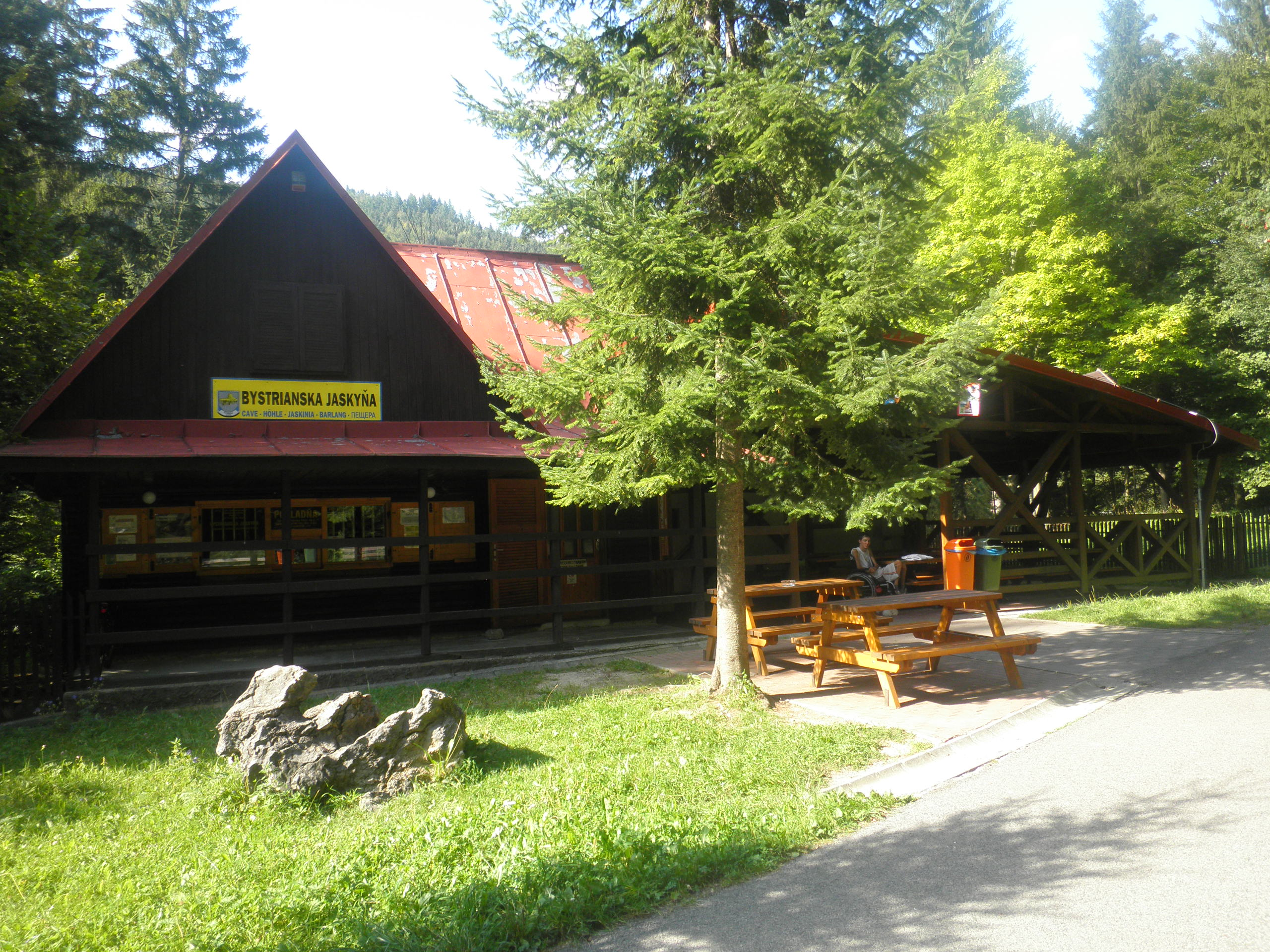 Infocentrum jaskyne